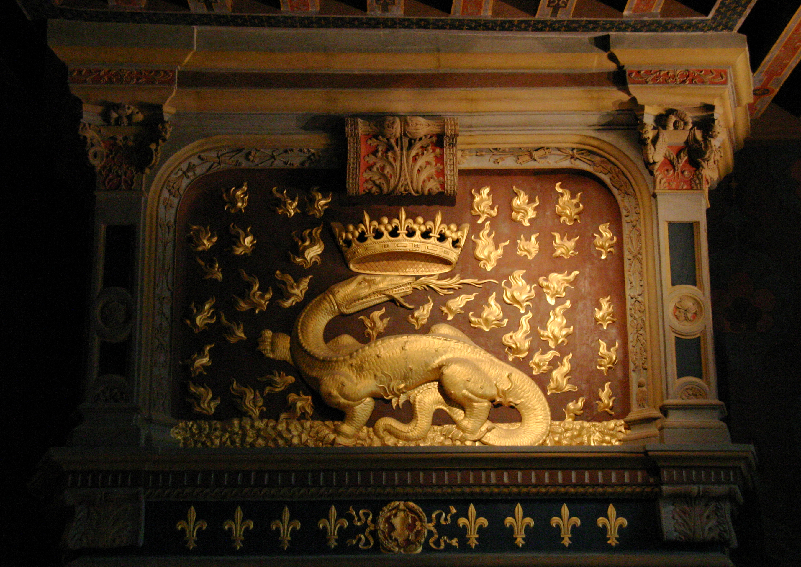 Château de Blois innen